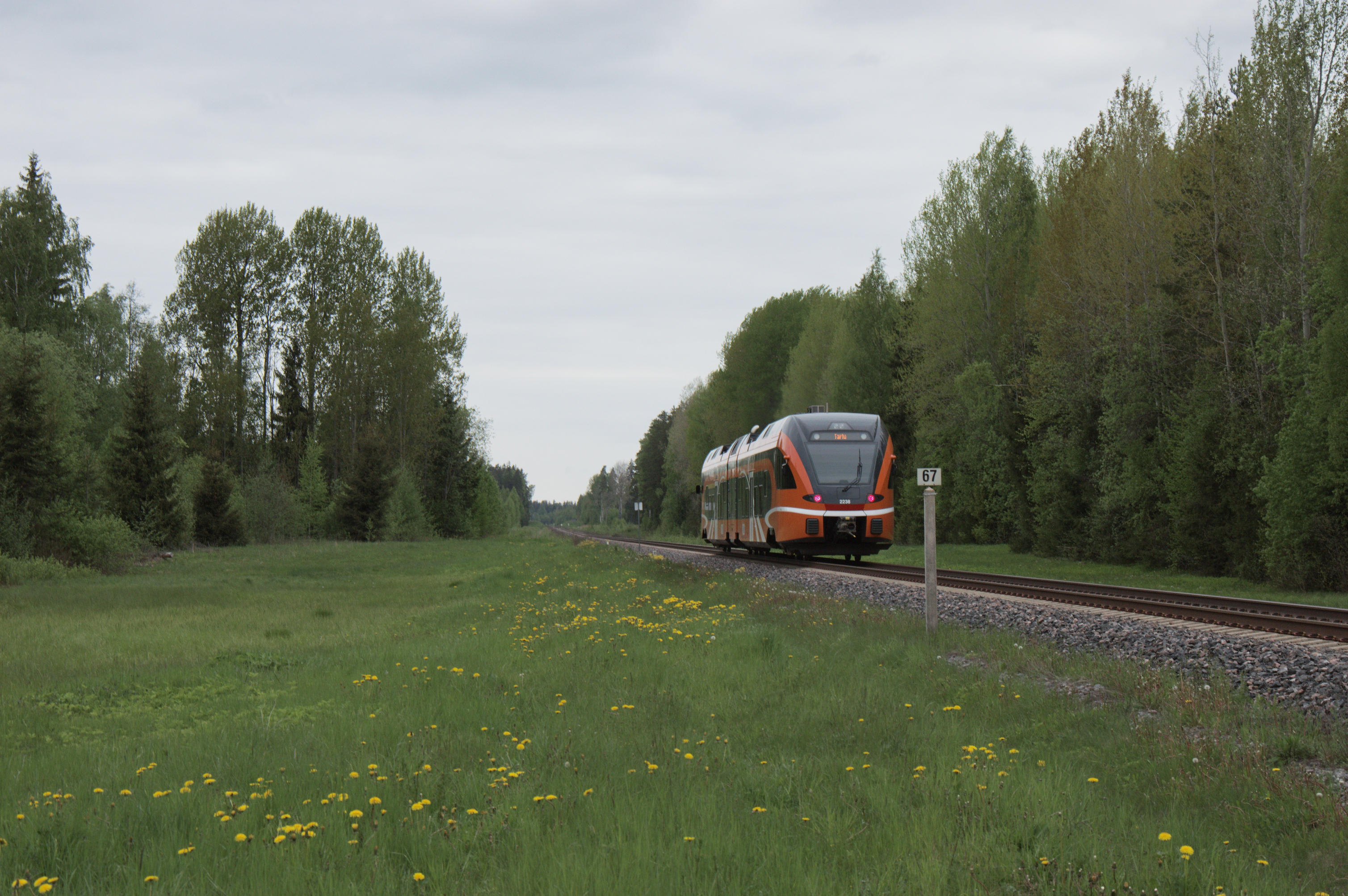 Elroni rong lahkumas Ilumetsa jaamast.